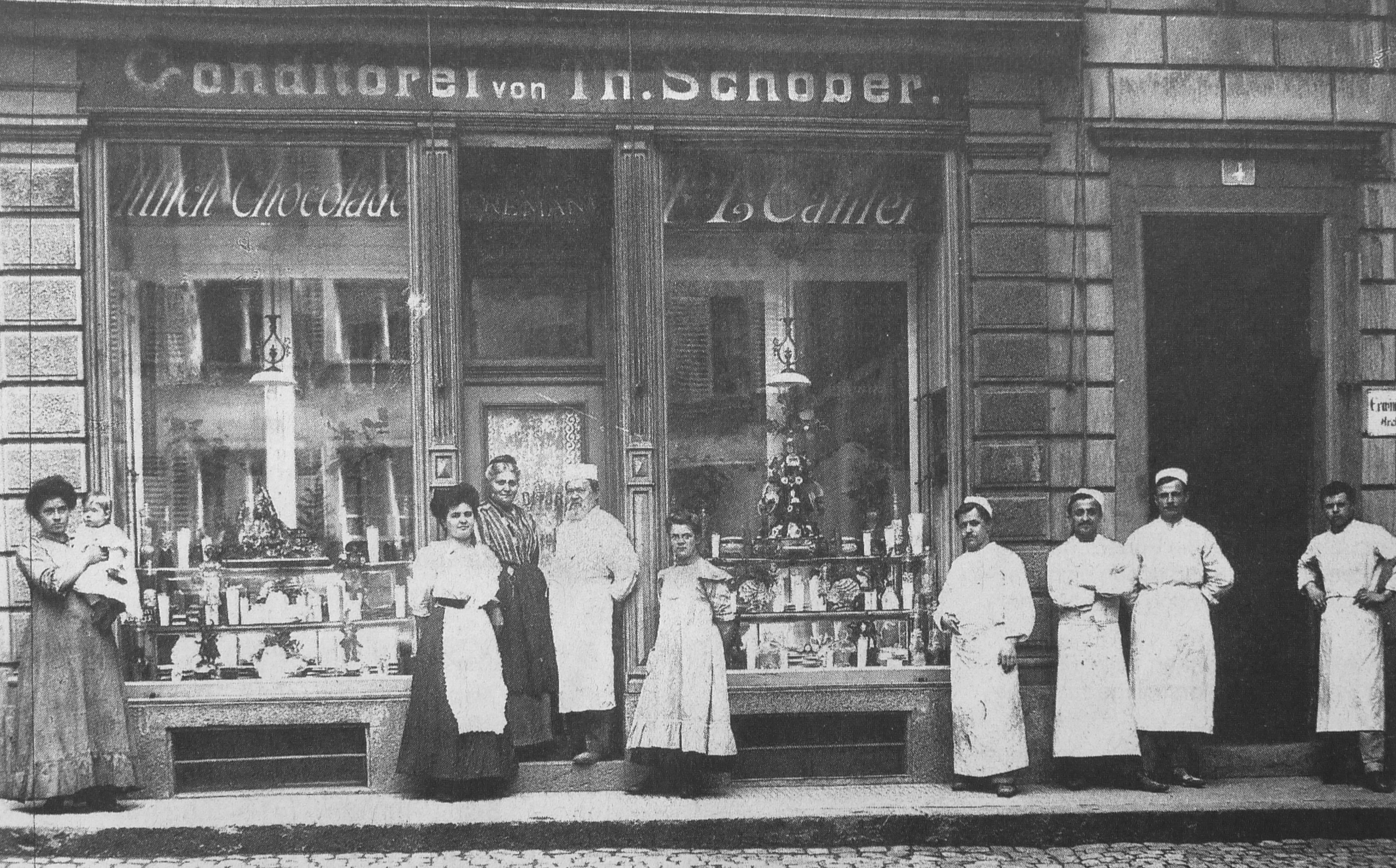 Conditorei Schober um 1890 in Zürich